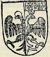 Stemma della famiglia Grassi